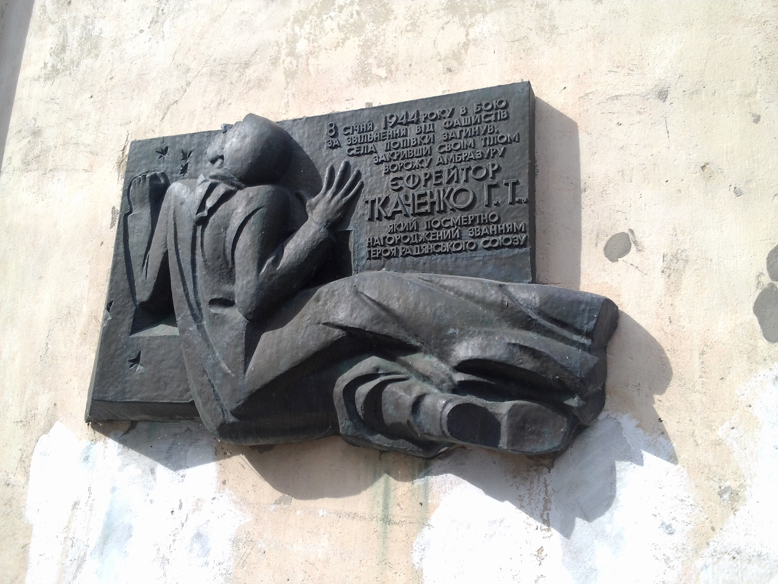 с. Попівка. Пам'ятна дошка на Будинку культури Герою Радянського Союзу Г.Т. Ткаченку.